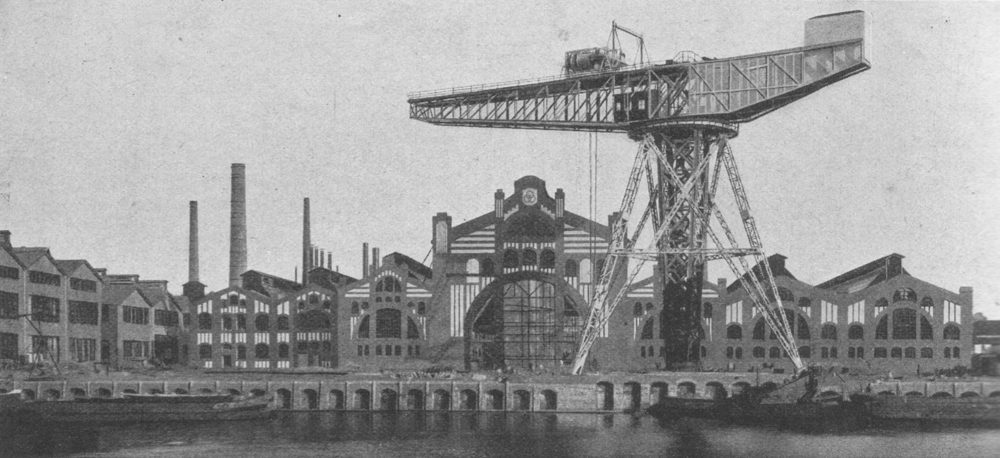 Ein Teil der Germaniawerft in Kiel im Jahr 1902.